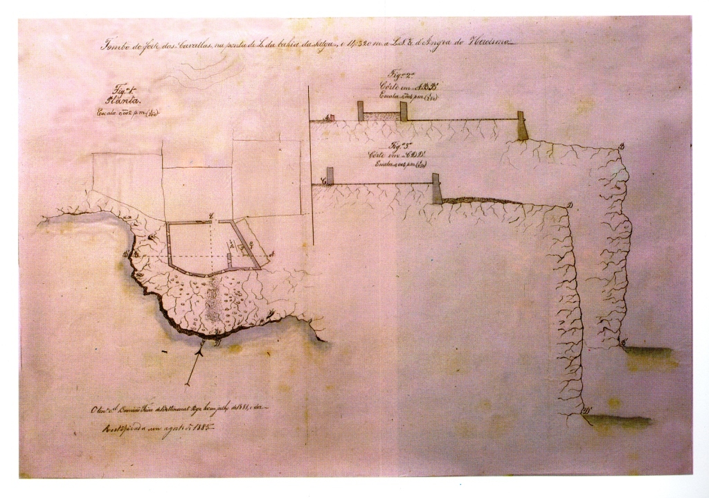 "Tombo do Forte das Cavallas, na ponta do L da bahia da Salga...", Ilha Terceira (Açores), Portugal.